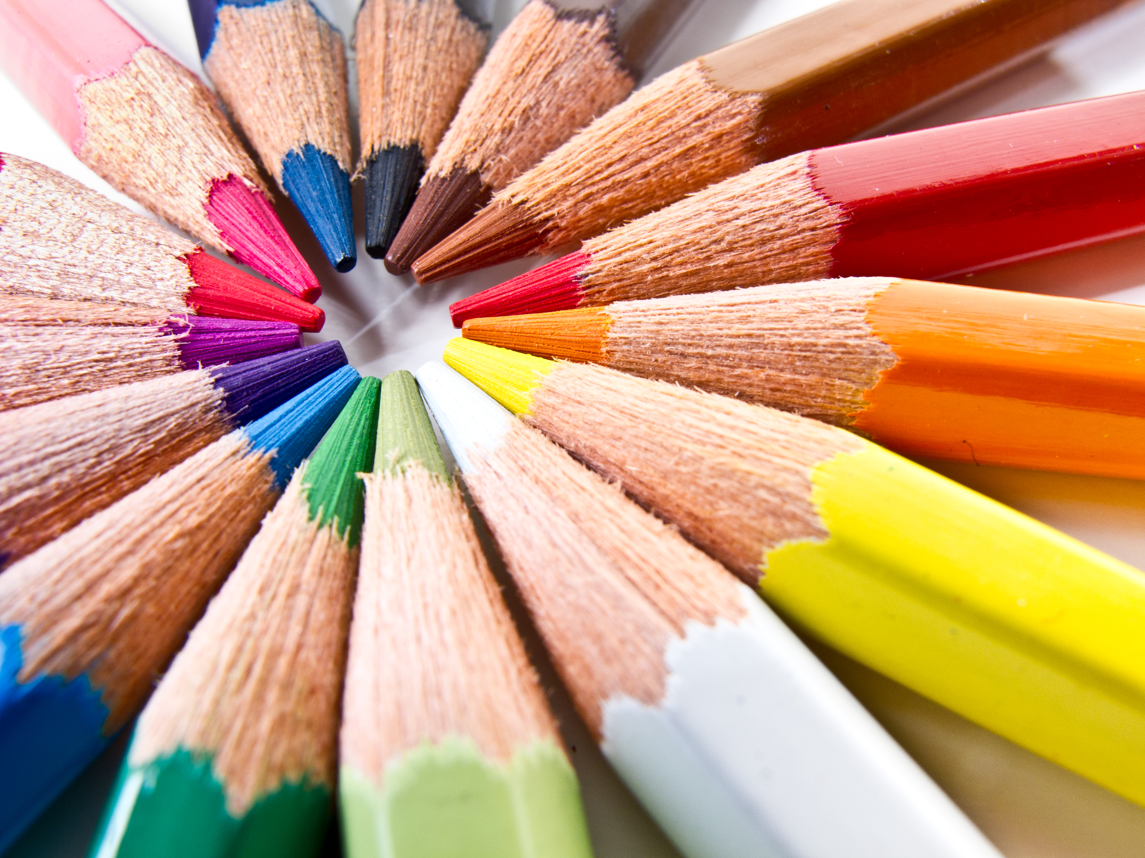 Hacía tiempo que me apetecía hacer un macro, y hoy que he tenido tiempo he aprovechado. Strobist info YN-560 desnudo a la derecha a 1/16@24mm SB-28 tras sombrilla traslúcida a 1/4@28mm a la izquierda